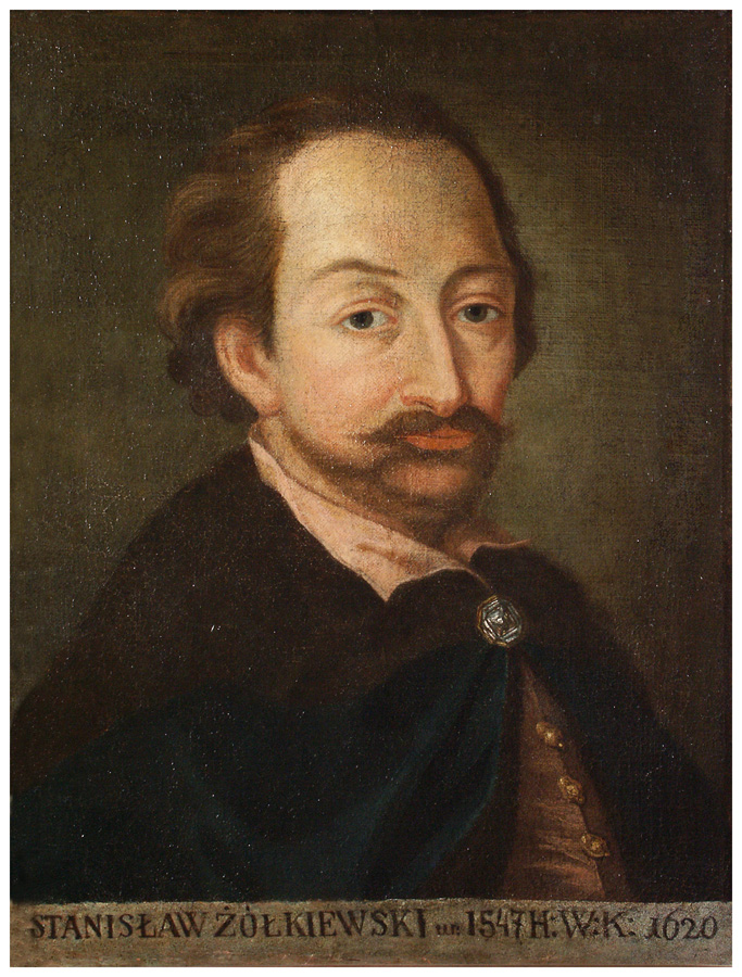 Portret Stanisława Żółkiewskiego